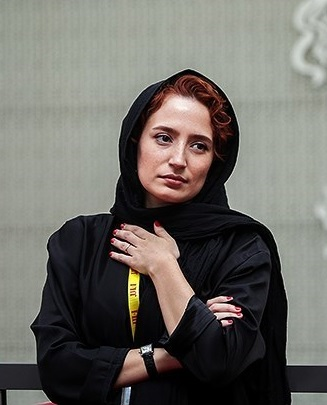 نگار جواهریان